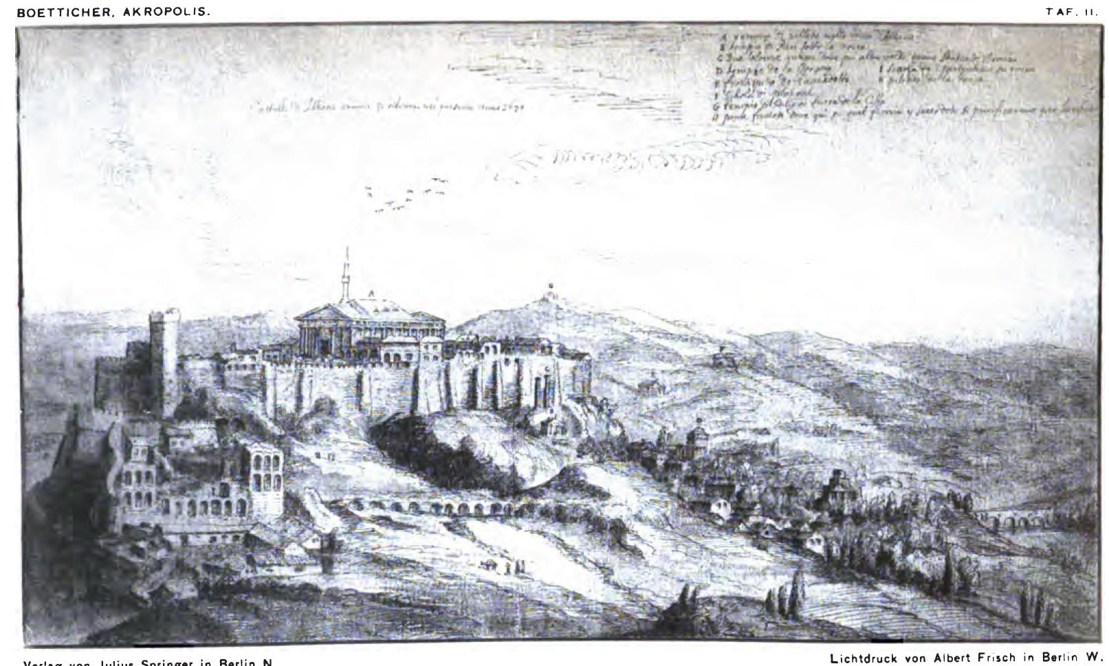 Akropolis im Jahre 1670